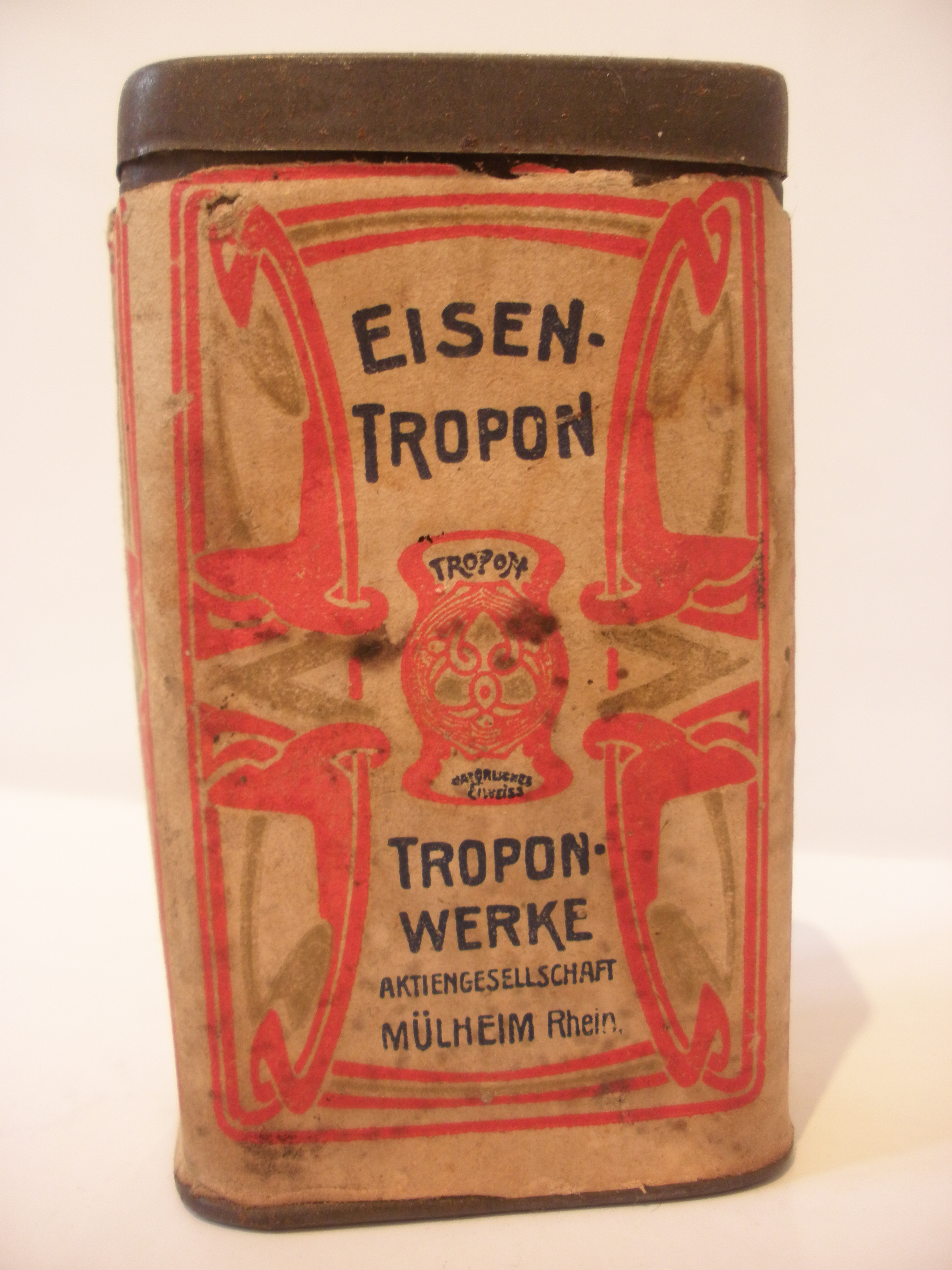 Blik van het merk Eisen-Tropon (ca. 1898) dat ontworpen is door Henry Van de Velde.